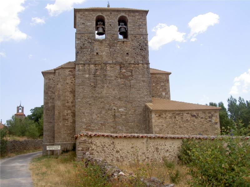 Iglesia de San Juan Bautista - Carrascosa de la Sierra (Soria)